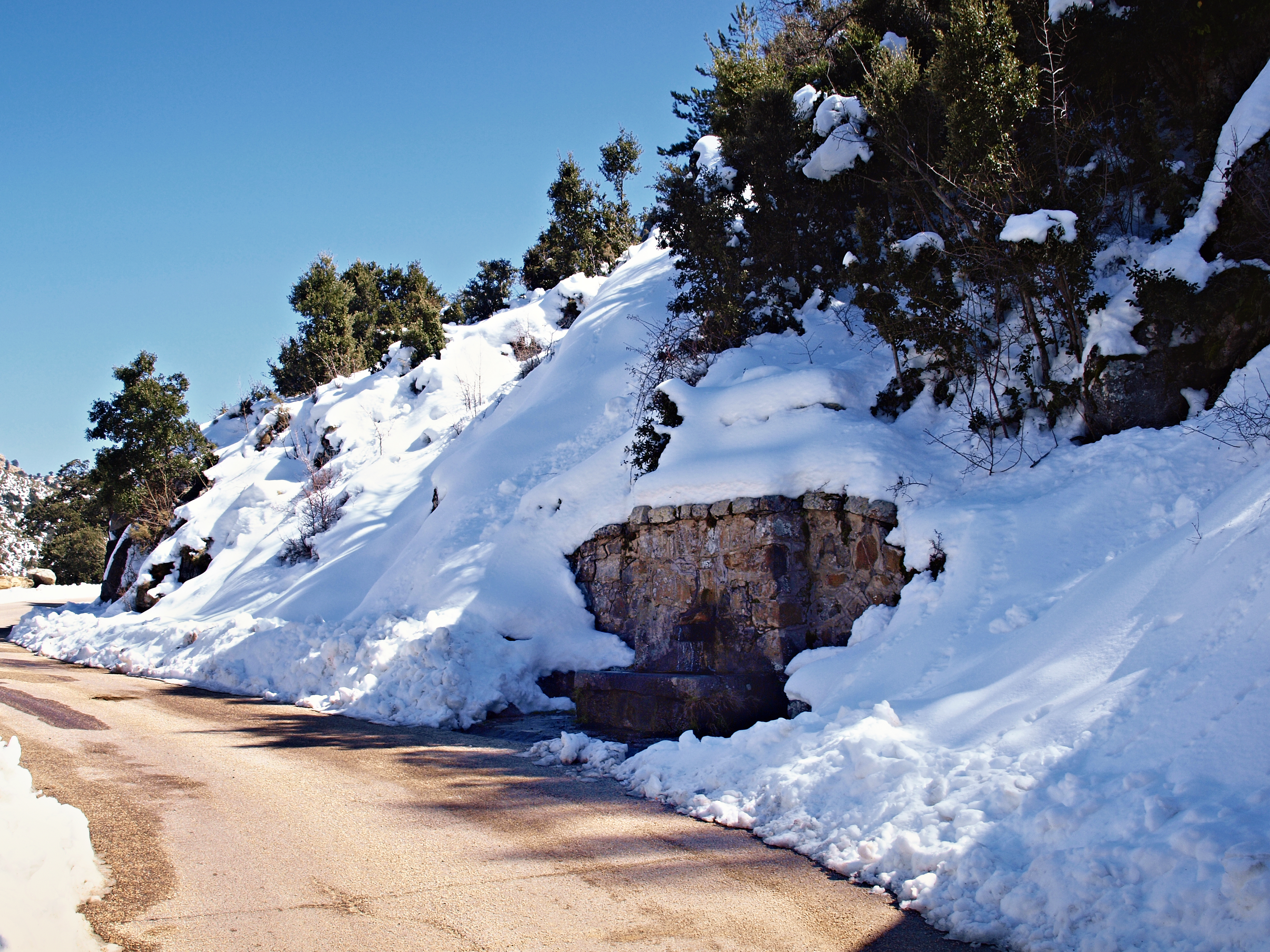 Olmi-Cappella (Corsica) - Fontaine d'Ombrese sous Bocca a Croce (D963)